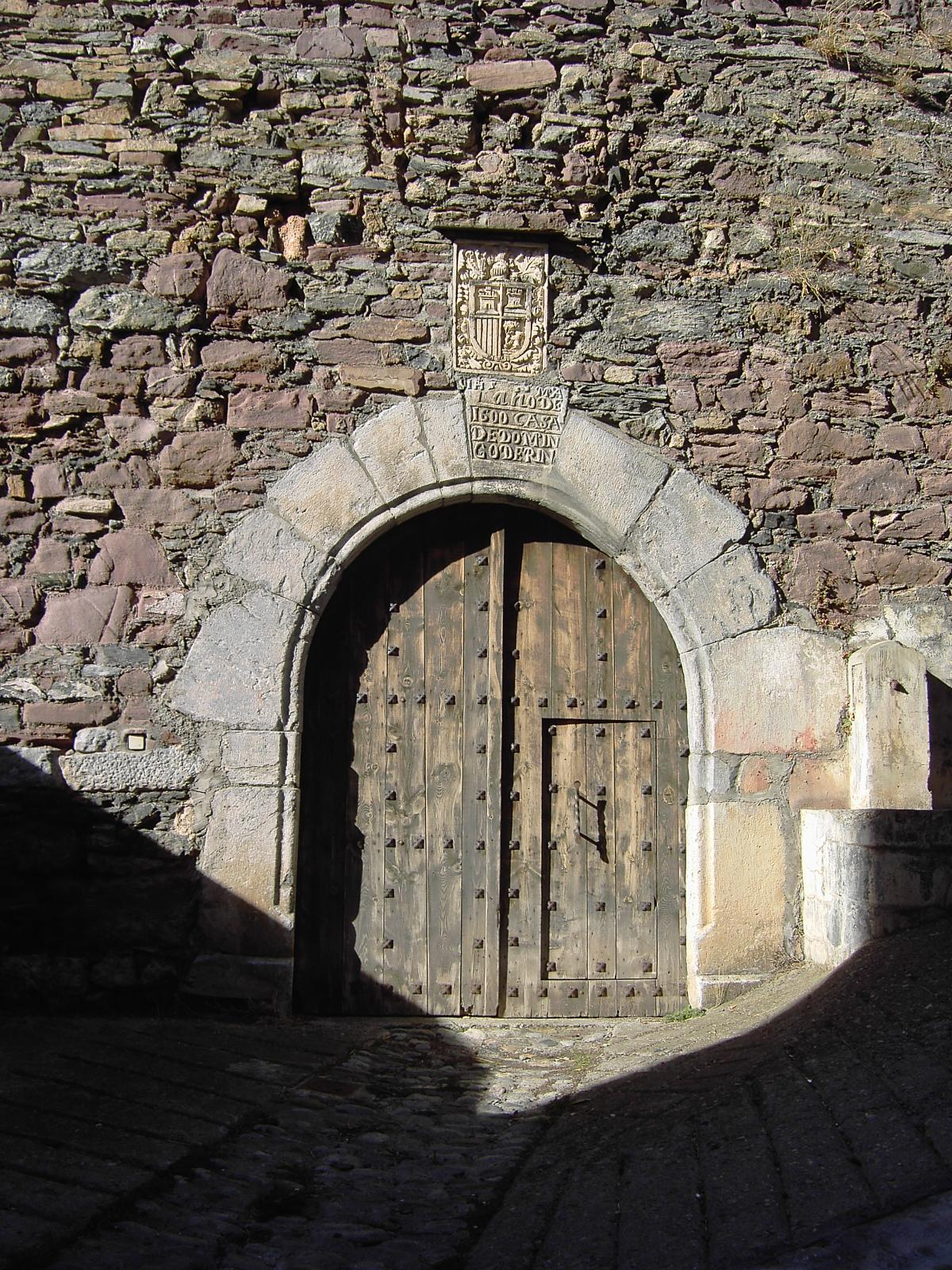 La vieja puerta de Casa de Rins en Chistén, donde se lee Año de 1600, Casa de Domingo de Rin.